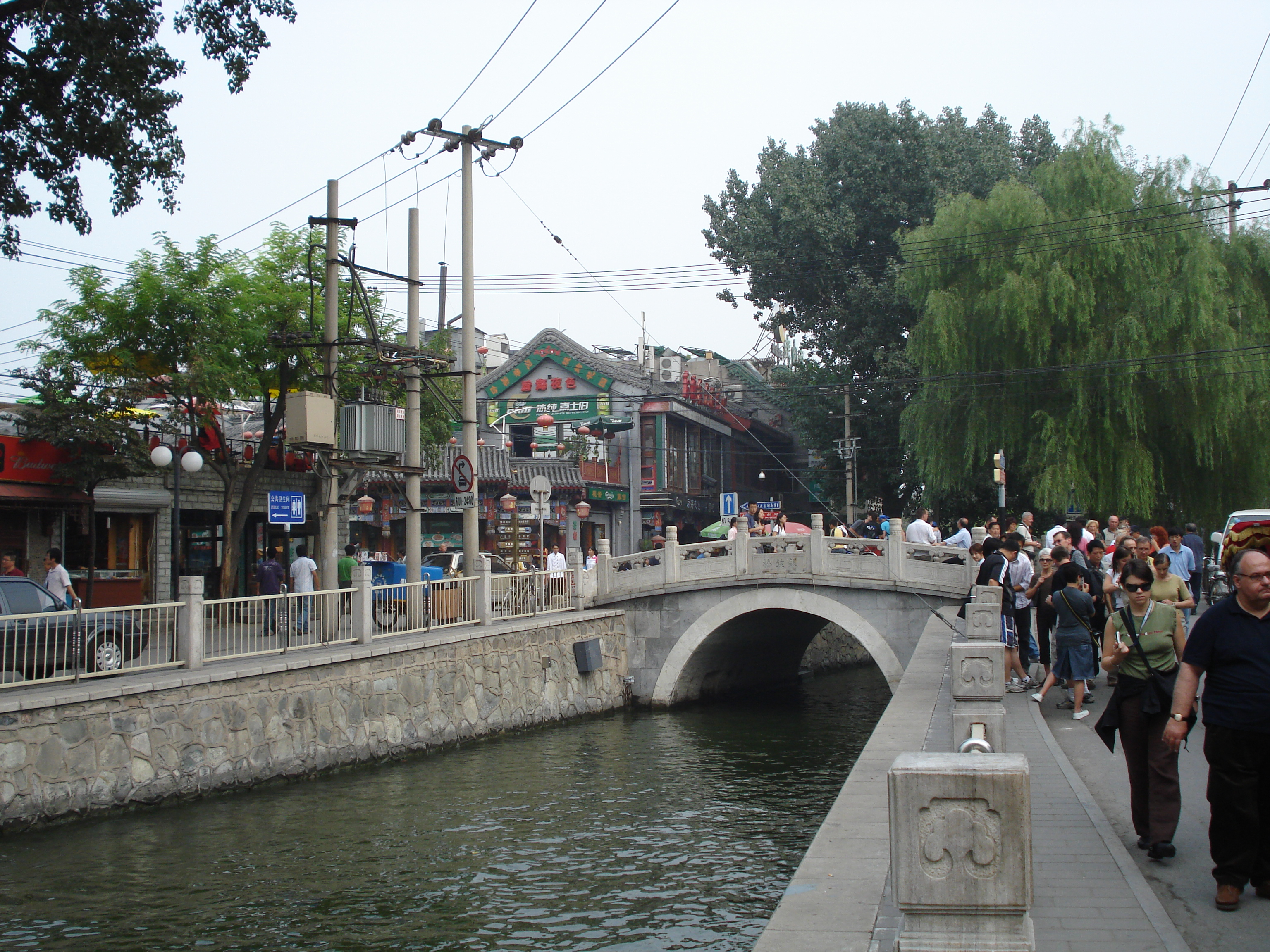 hutong in Bejing